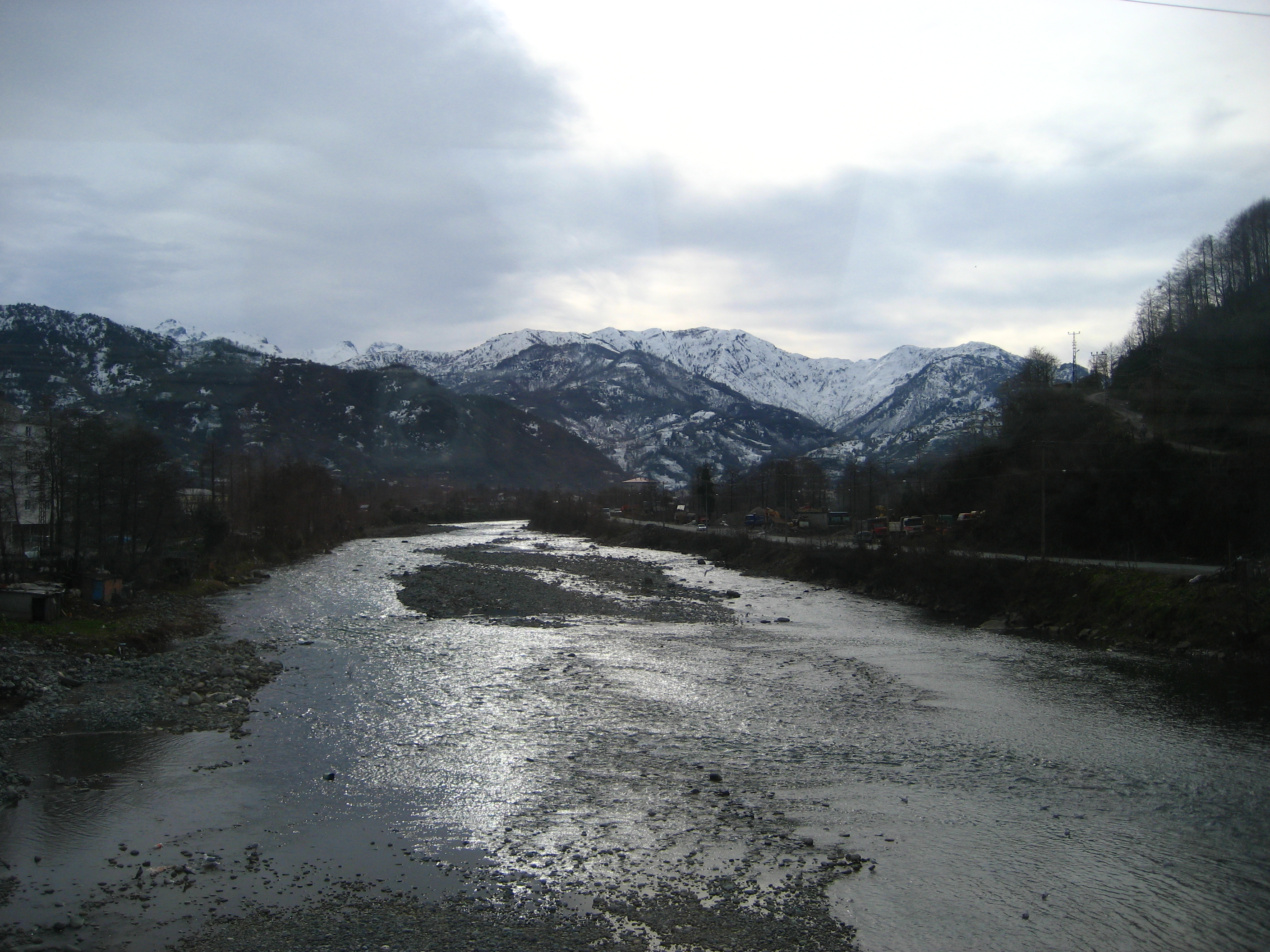 74_Hopa_river